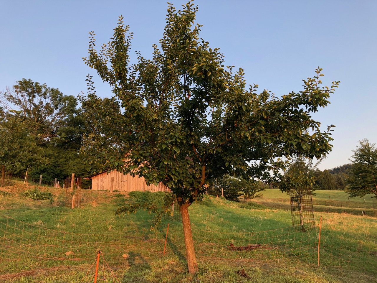 Roste v obci Bystřice. Určeno pomocí návěsky.